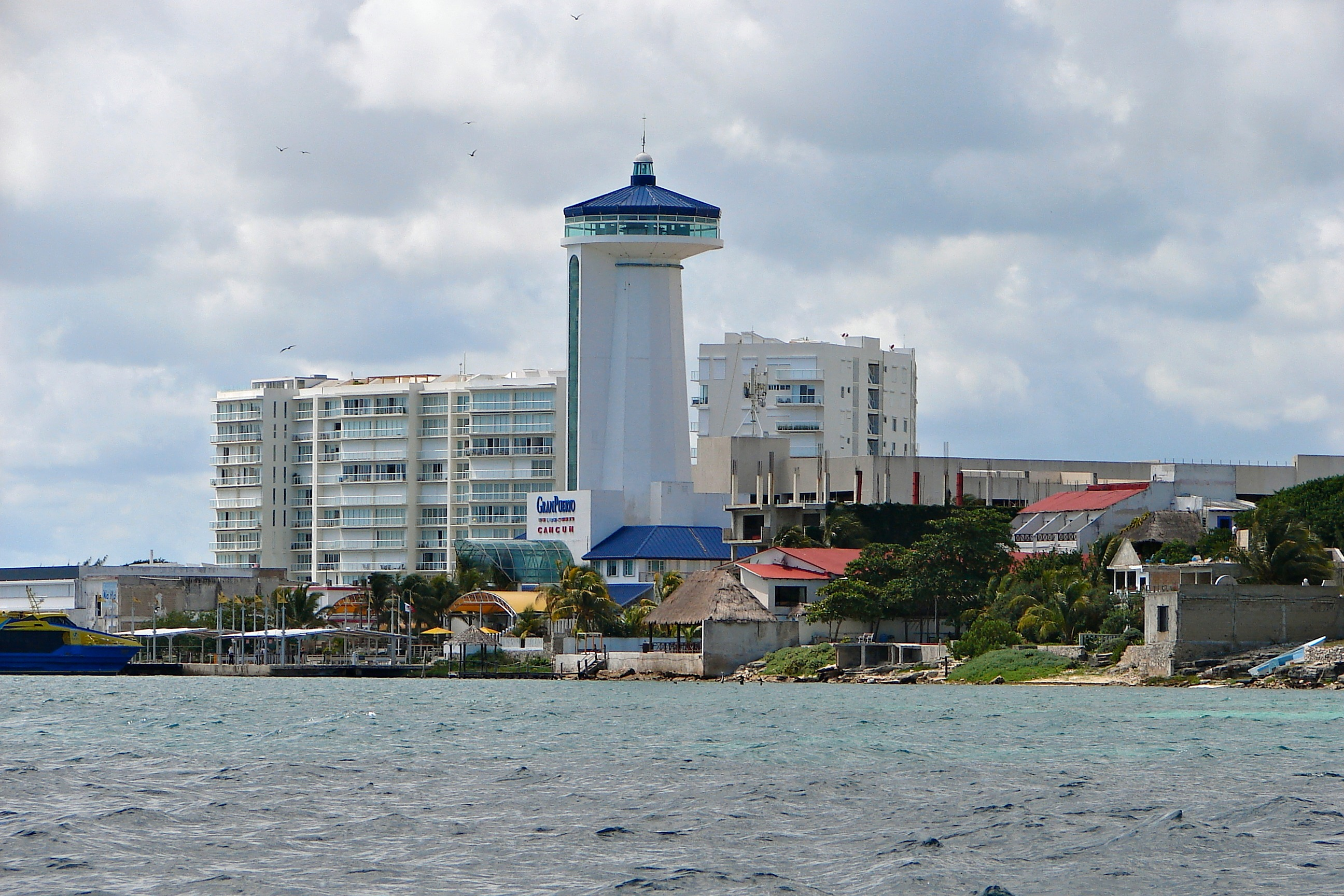 Puerto Juárez, Cancún, Mexico